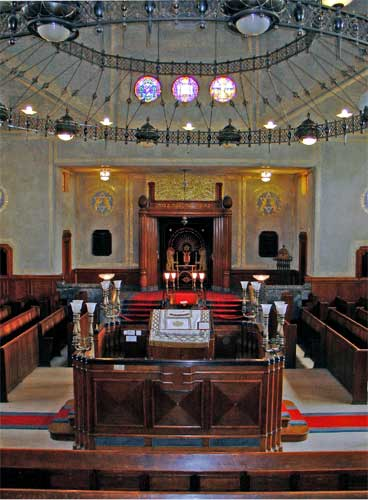 Interieur van de synagoge te Enschede (architect Karel de Bazel)